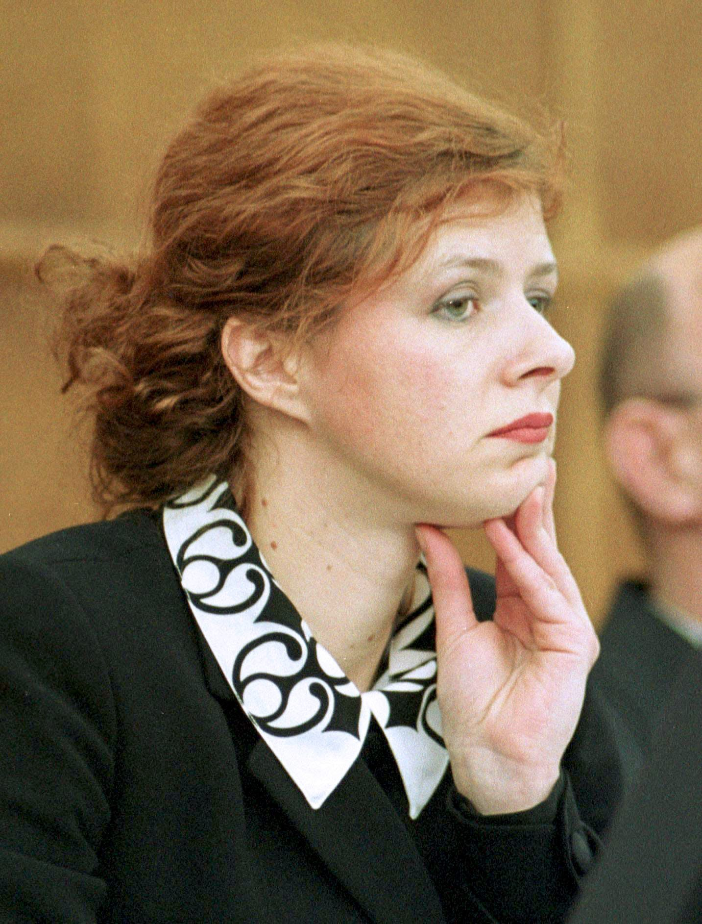 Фотографија бивше в. д. Председнице Републике Србије Наташе Мићић, аутора Емила Ваша.